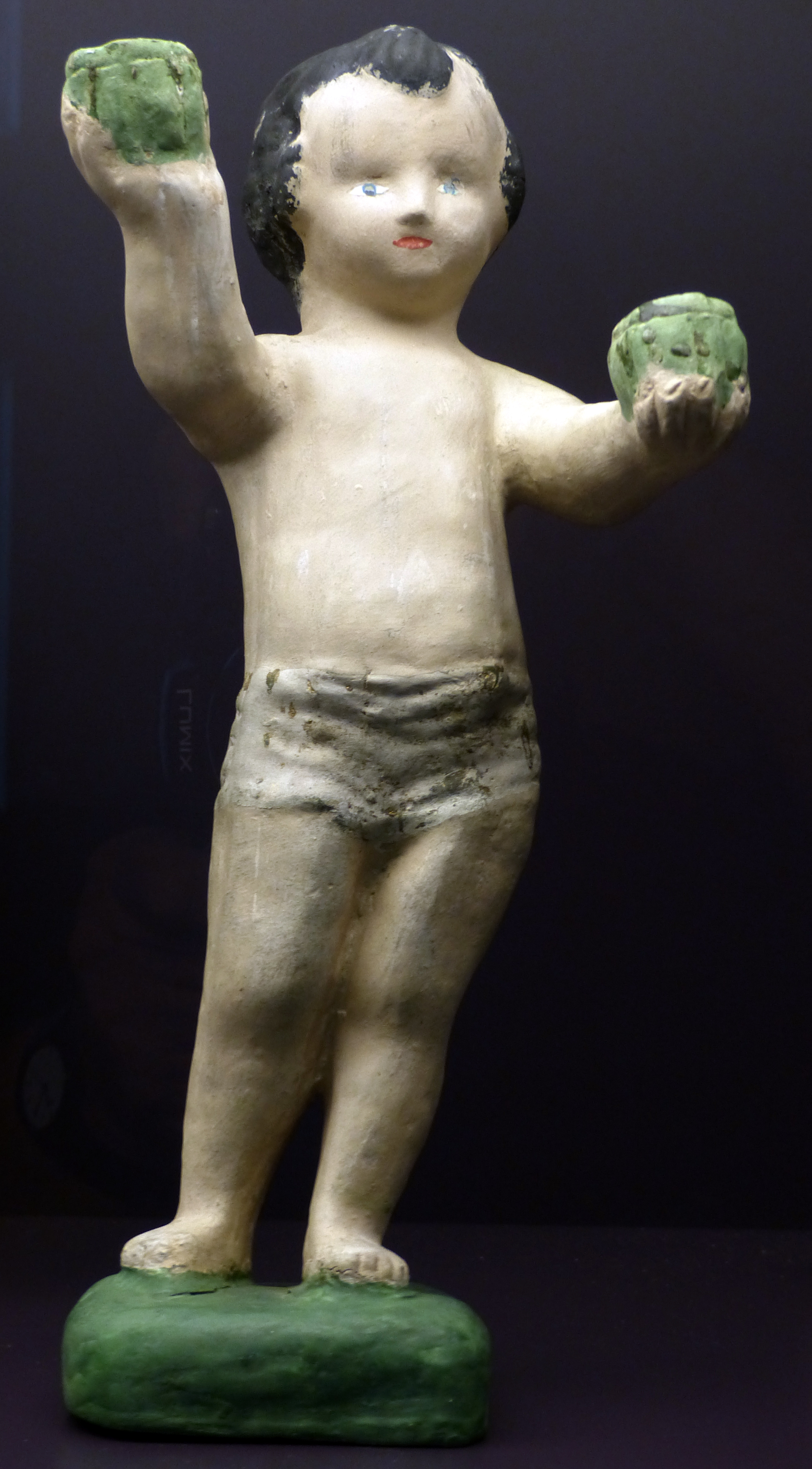 Mothsgung, Weihnachtsfigur von Karl Mothes, Scheibenberg, 2. Viertel, 20. Jahrhundert; Museum Manufaktur der Träume, Annaberg-Buchholz